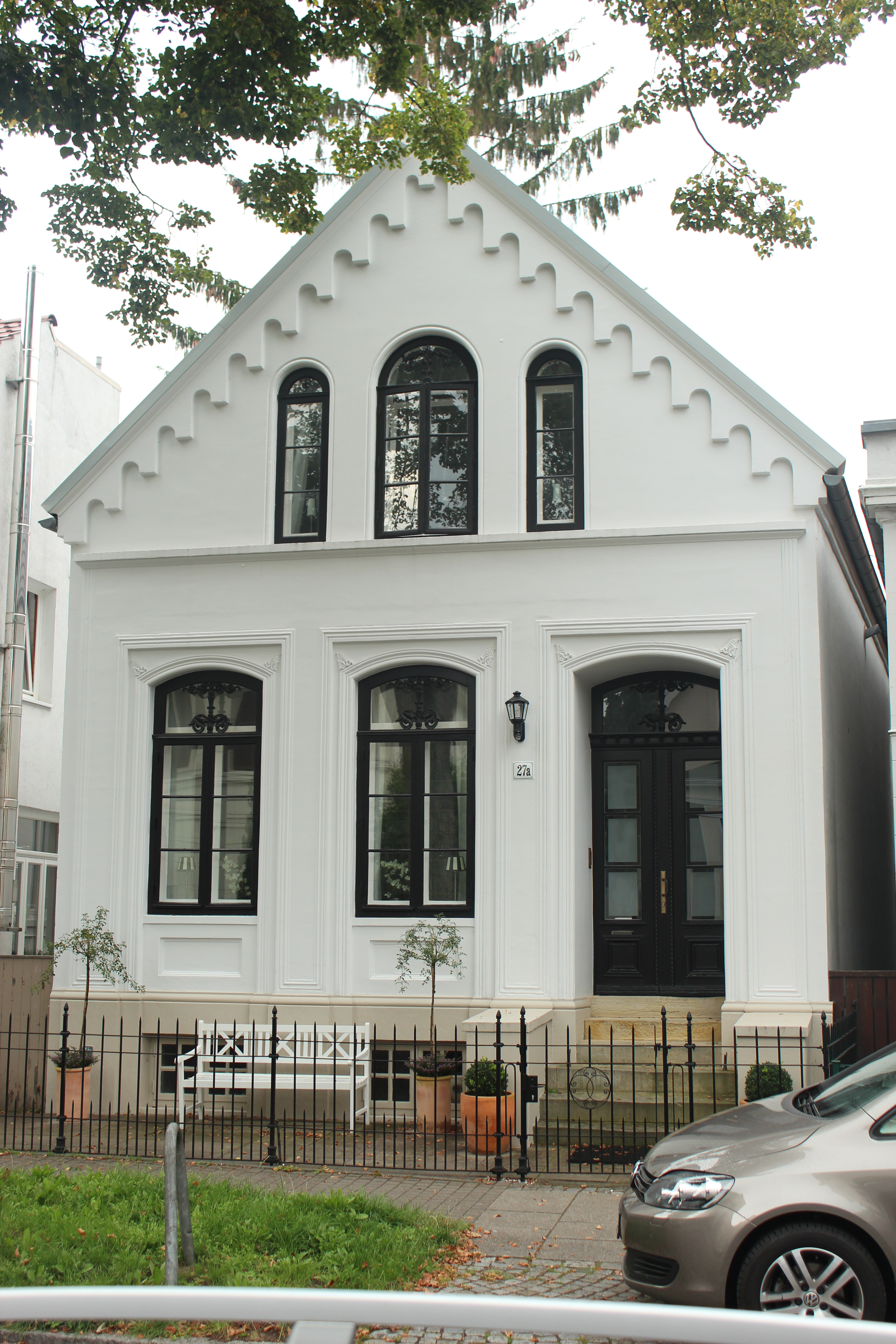 Haus Kapitän Vespermann in Bremen, Weserstraße 27A.Das abgebildete Objekt ist ein geschütztes Kulturdenkmal in der Freien Hansestadt Bremen, mit der Nr. 1327 beim Landesamt für Denkmalpflege registriert.